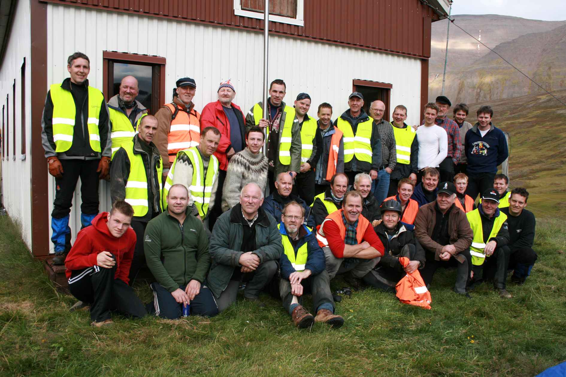 Gangnamenn við Stekkjarhús, Sveinsstaðaafrétt